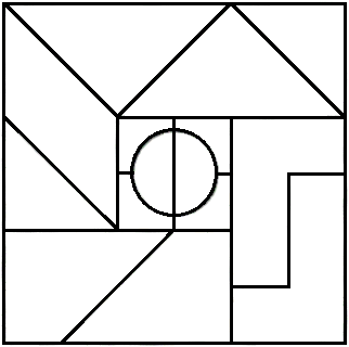 十五巧版圖